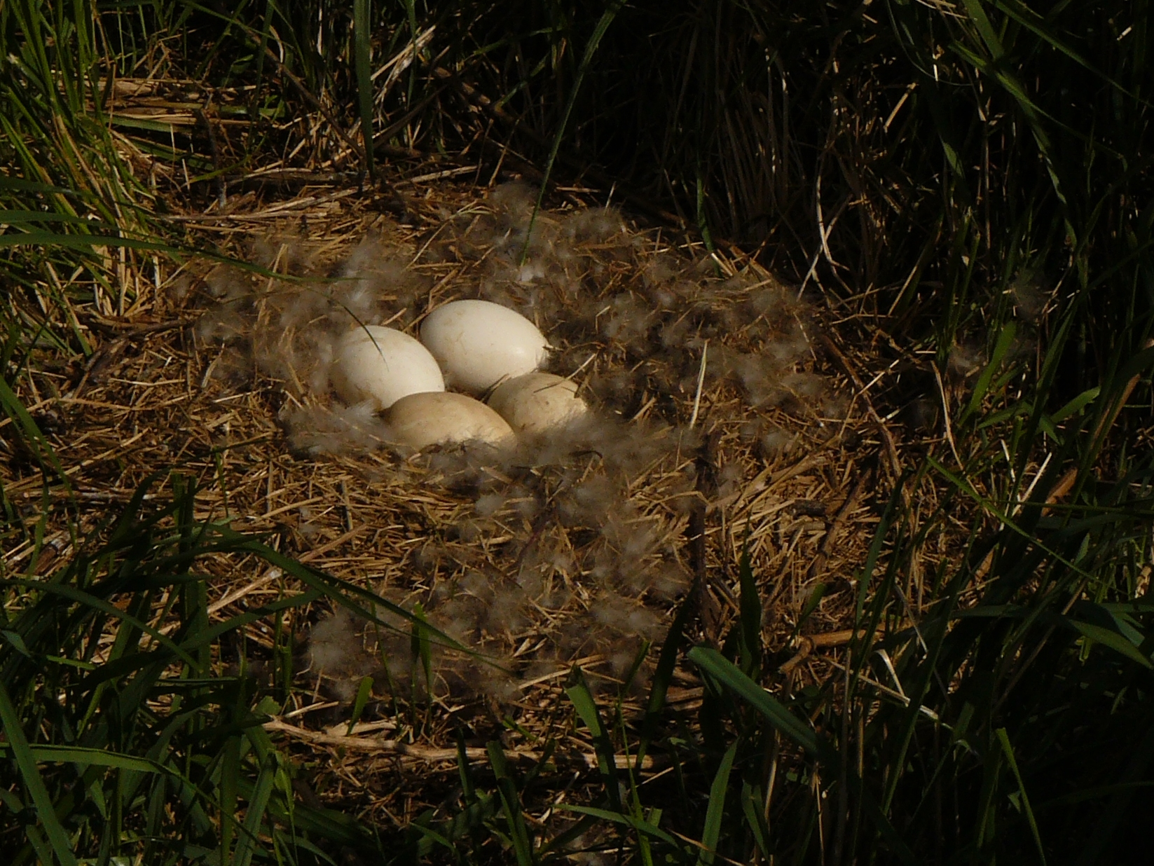 Gelege der Graugans (Anser anser)